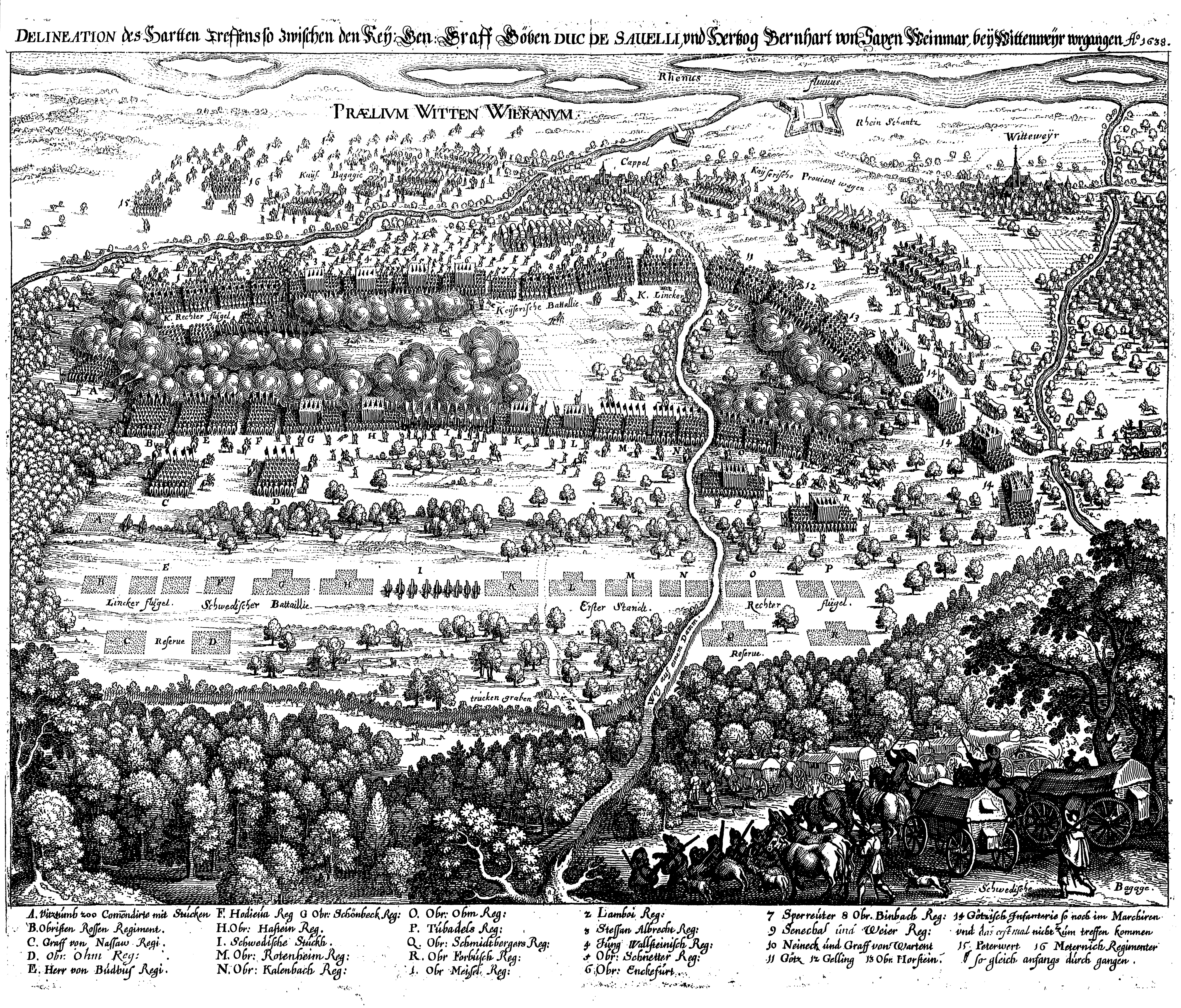 Matthaeus Merian: RHEINAU-WITTENWEIHER / Baden: Schlachtszene mit den Schweden bei Witteweyr und Cappel